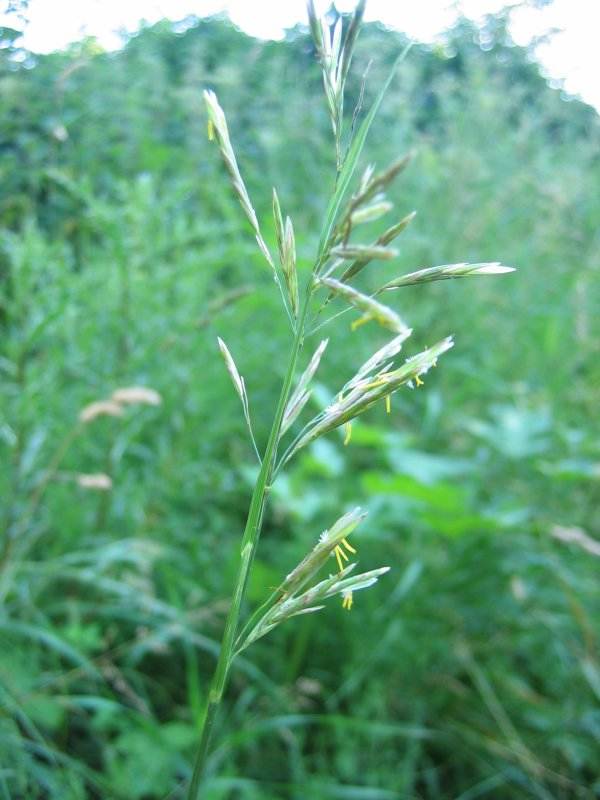 Wehrlose Trespe Bromus inermis, Müritz-Gebiet